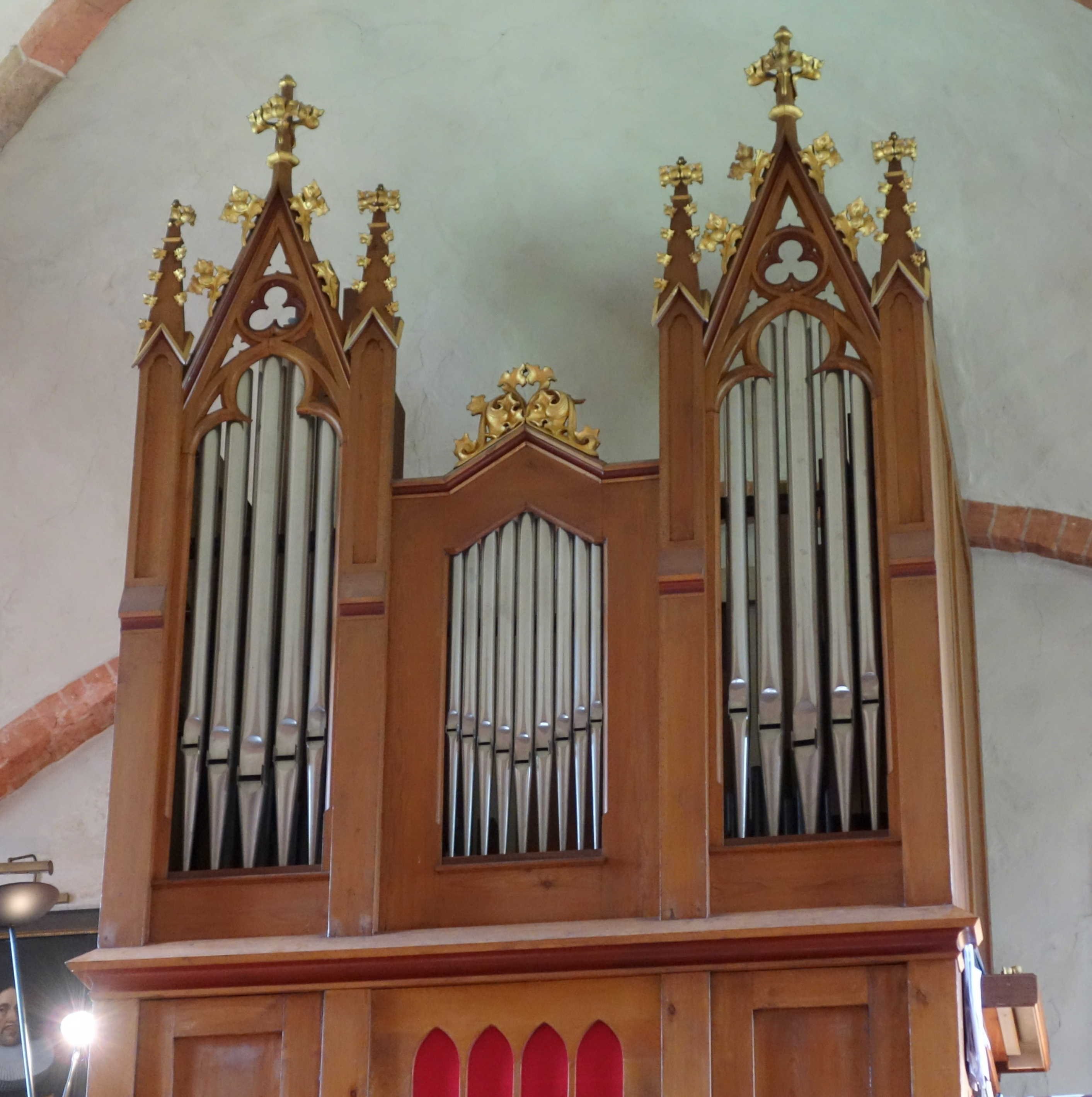 Orgel in Behlendorf, Kreis Herzogtum Lauenburg, Niedersachsen, Deutschland